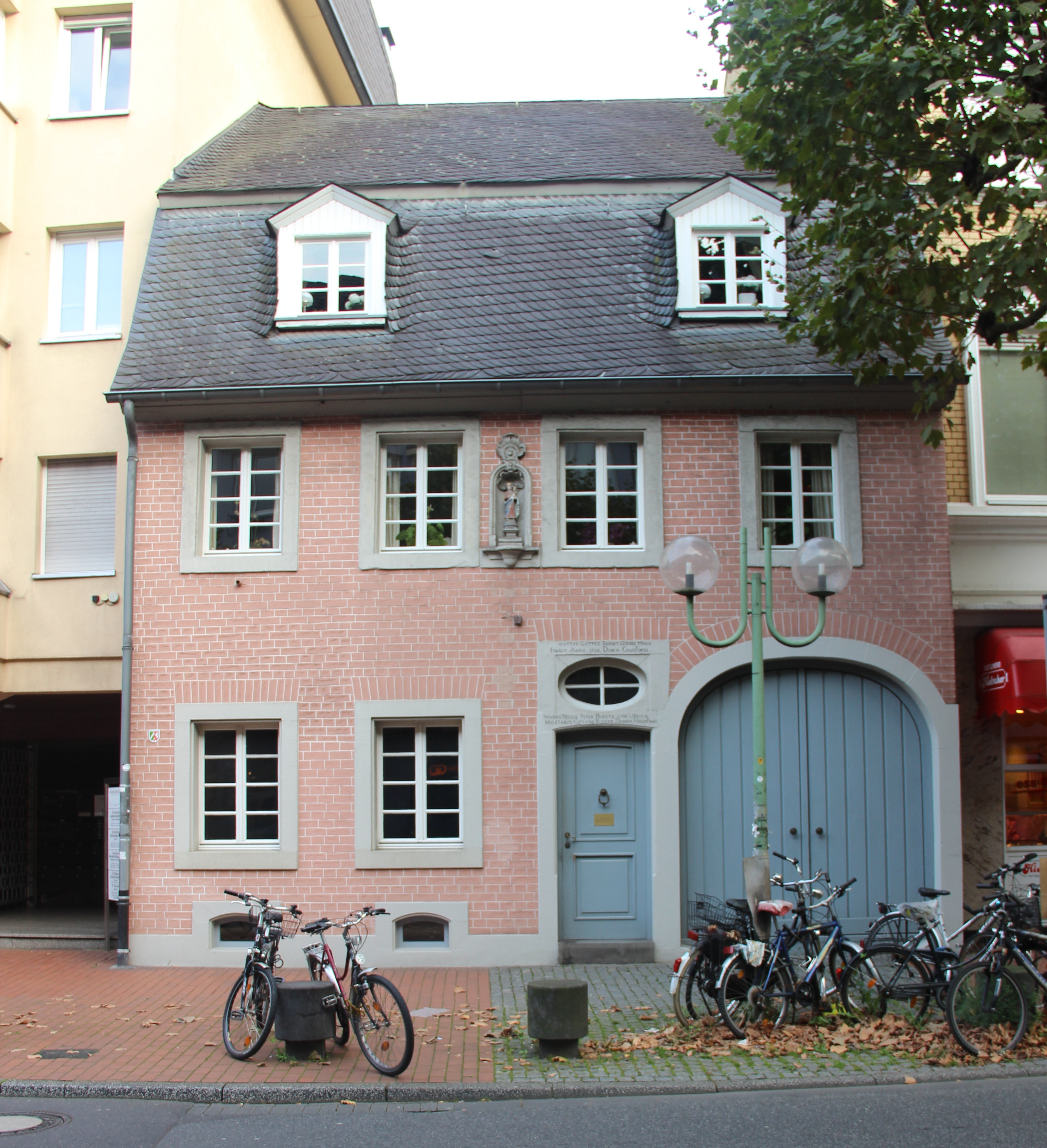 Das kurfürstliche Wasserträgerhaus, Clemens-August-Straße 13, Bonn-PoppelsdorfThis is a photograph of an architectural monument. 366